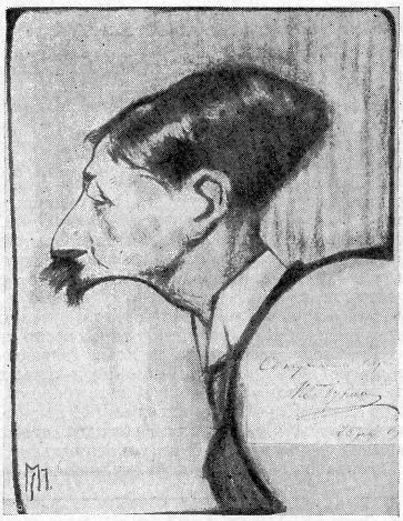 Карикатура М. С. Линского